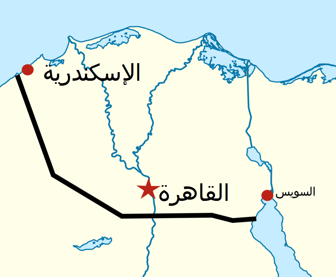 خط سوميد.